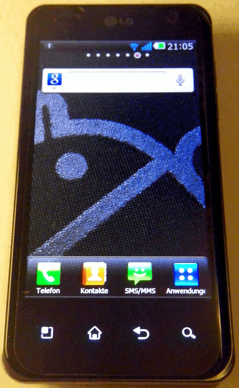 LG P990 Optimus SPEED (LG Optimus 2X)